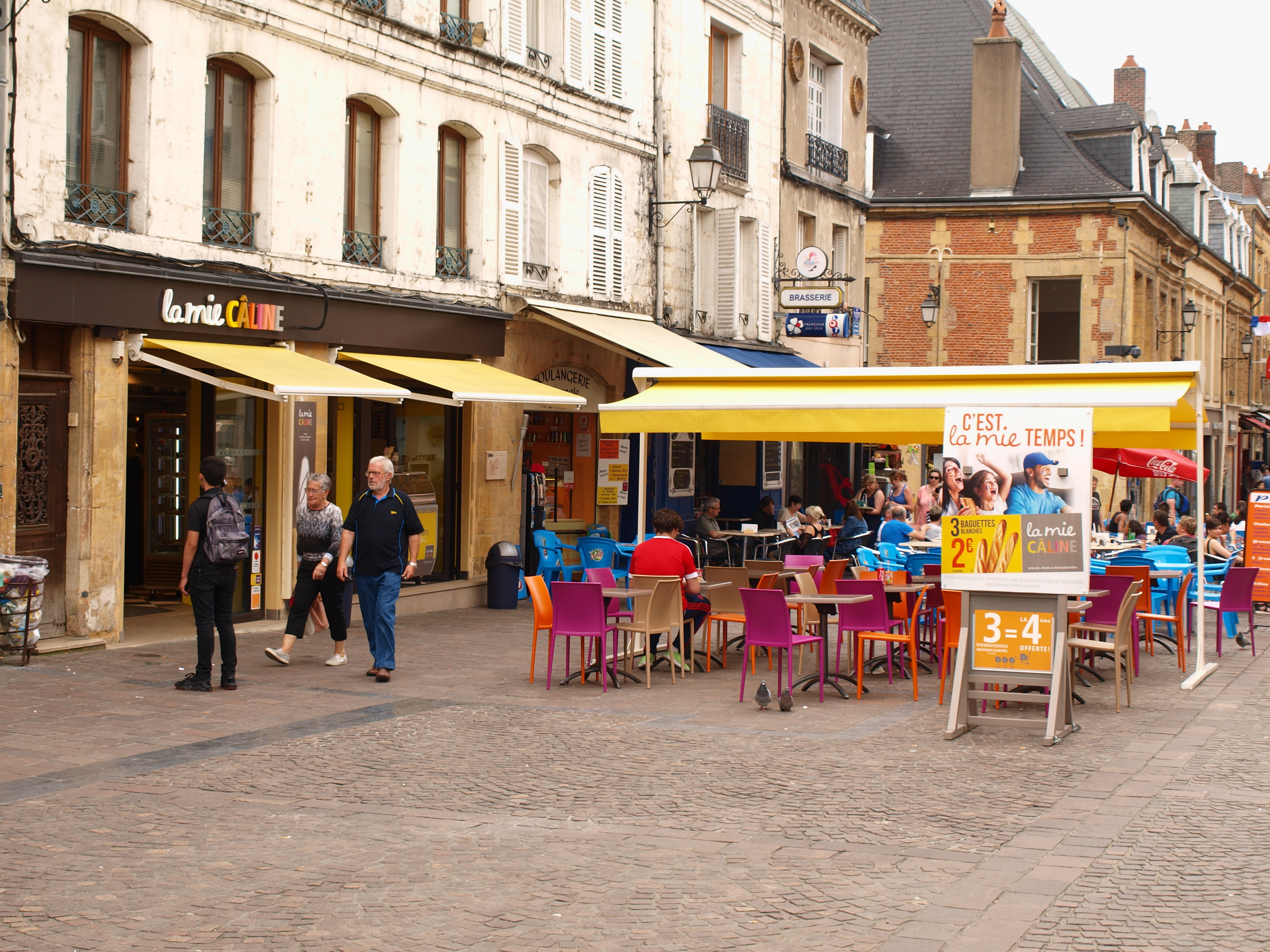 Un des commerces de Charleville-Mézières (Ardennes, France)